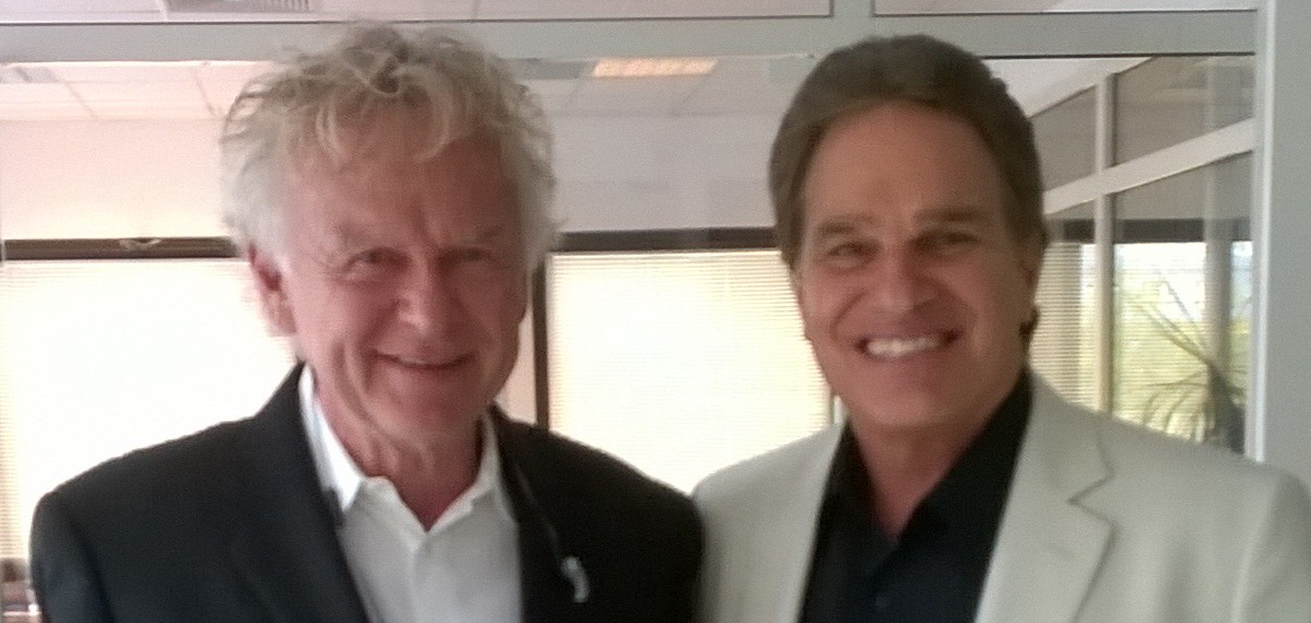 Phil Driscoll und Terry MacAlmon am 21. Juni 2015 vor einem Konzert im IGC in Berlin-Lichtenberg